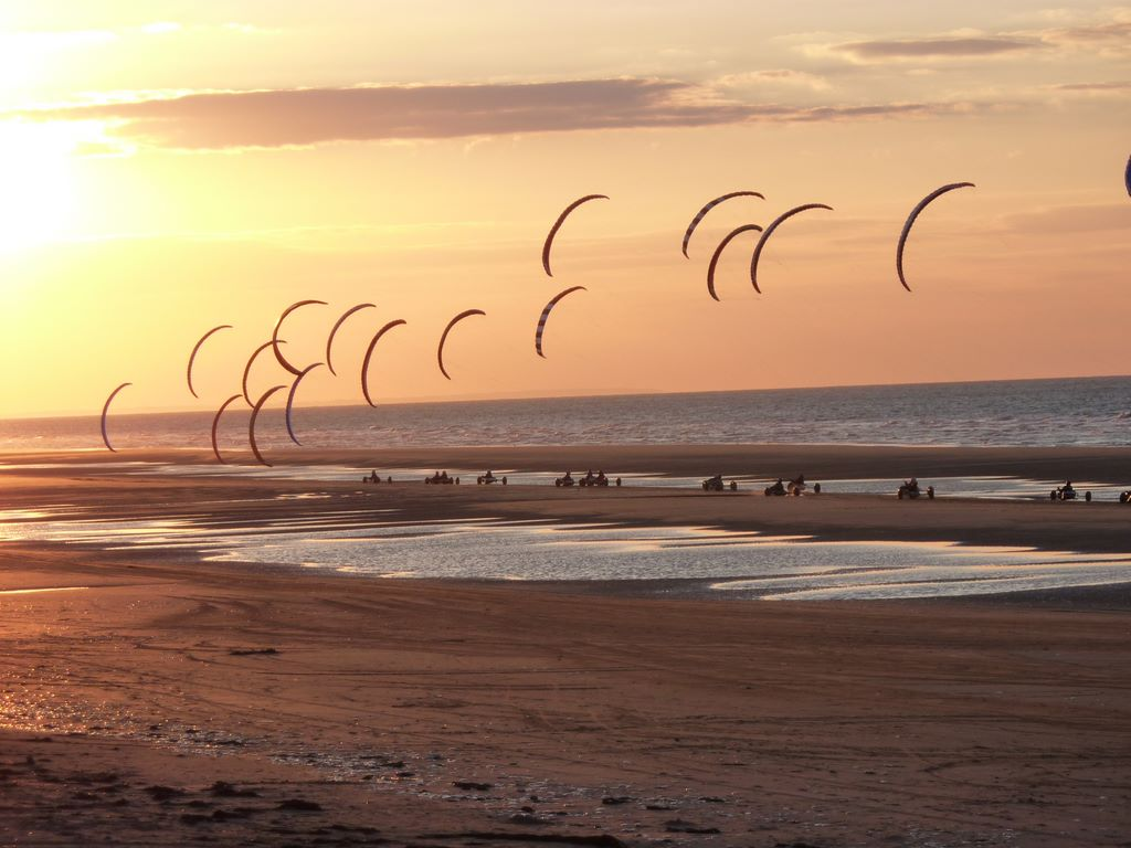 Fromentine